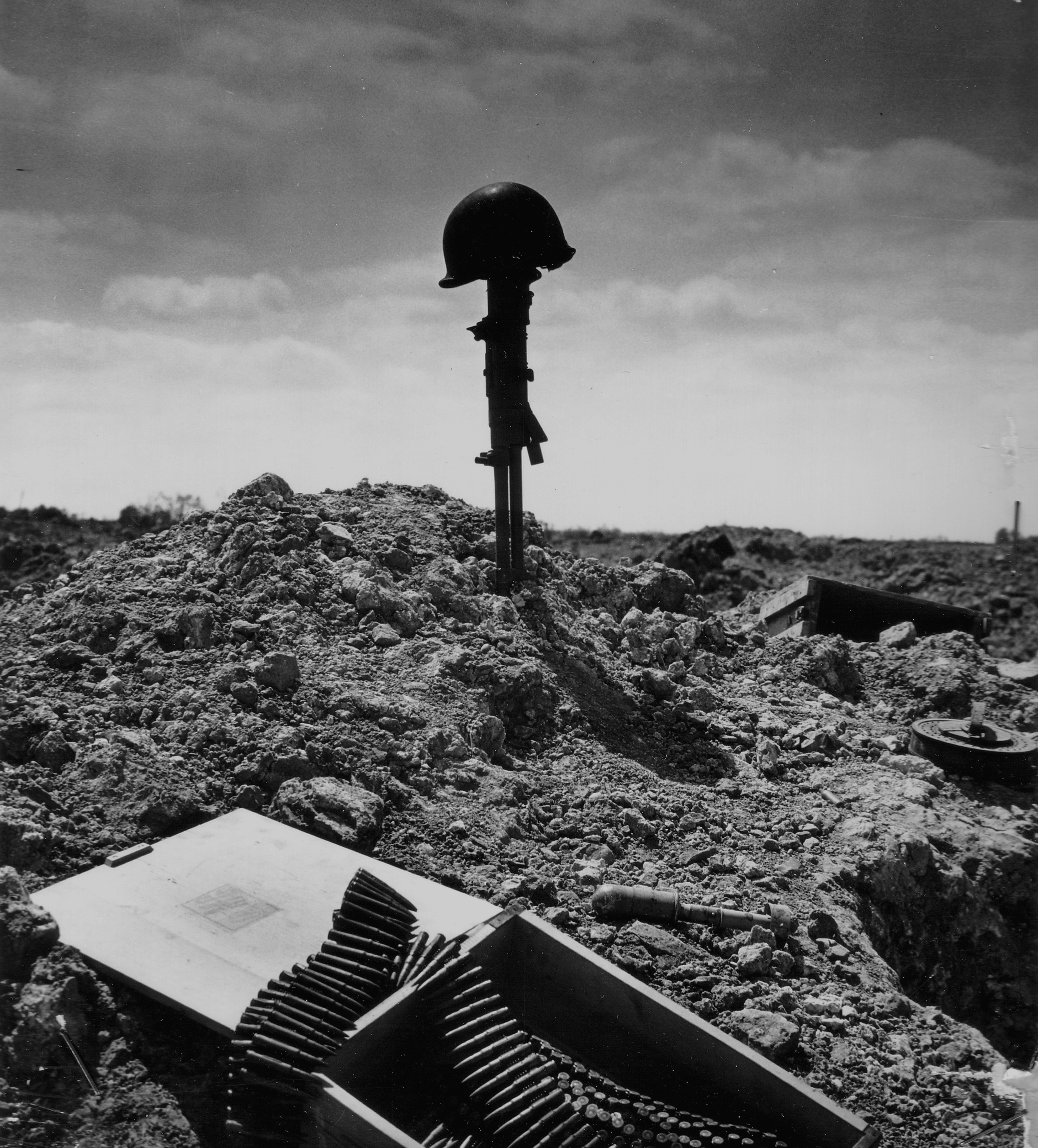 Desembarco de Normandía, una operación donde se produjeron numerosas bajas. 1944 débarquement américain en Normandie : Le champ de bataille est jonché de petit matériel de guerre. Au milieu des caisses à bandes de mitrailleuse et des mines antichars se dresse le fusil BAR M1918 planté en terre par le canon, coiffé du casque du soldat dont il marque la tombe provisoire. Conseil Régional de Basse-Normandie / National Archives USA